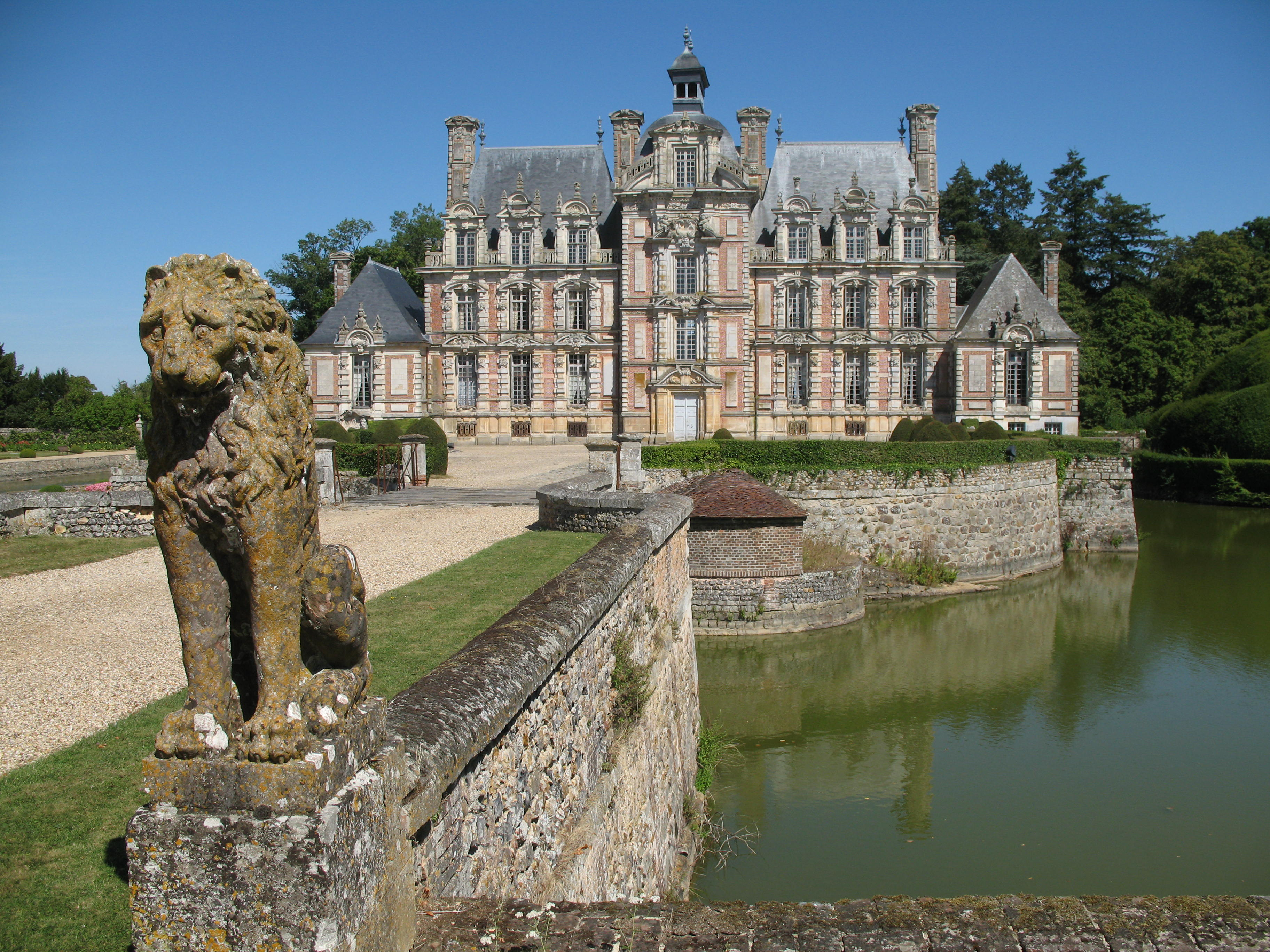 Château de Beaumesnil, à Beaumesnil dans l'Eure